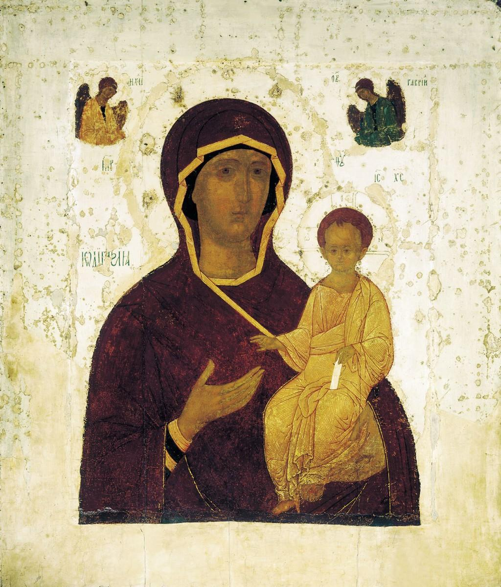 Богоматерь Одигитрия. Русский музей, Санкт-Петербург.